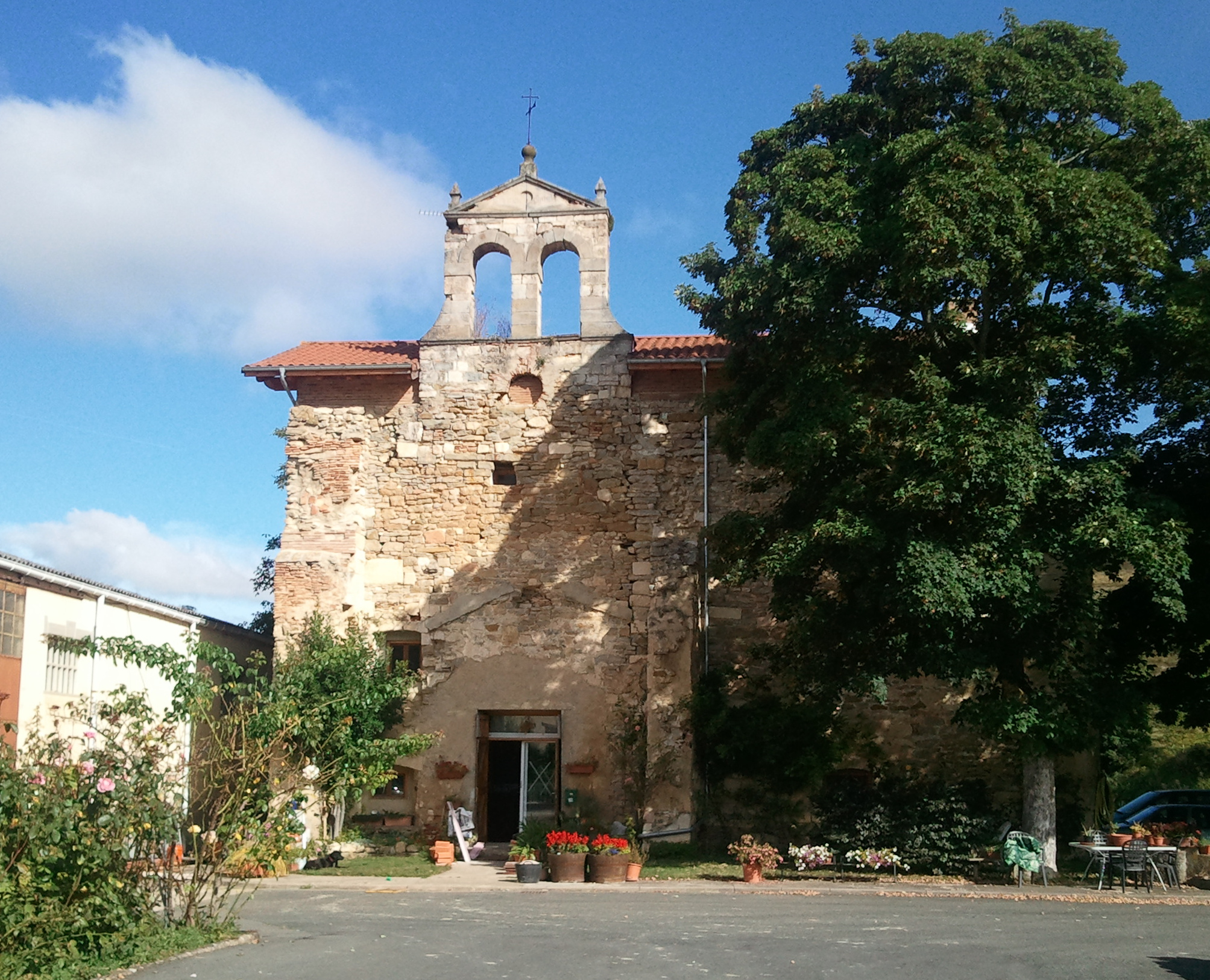 Bolibar (Gasteiz)